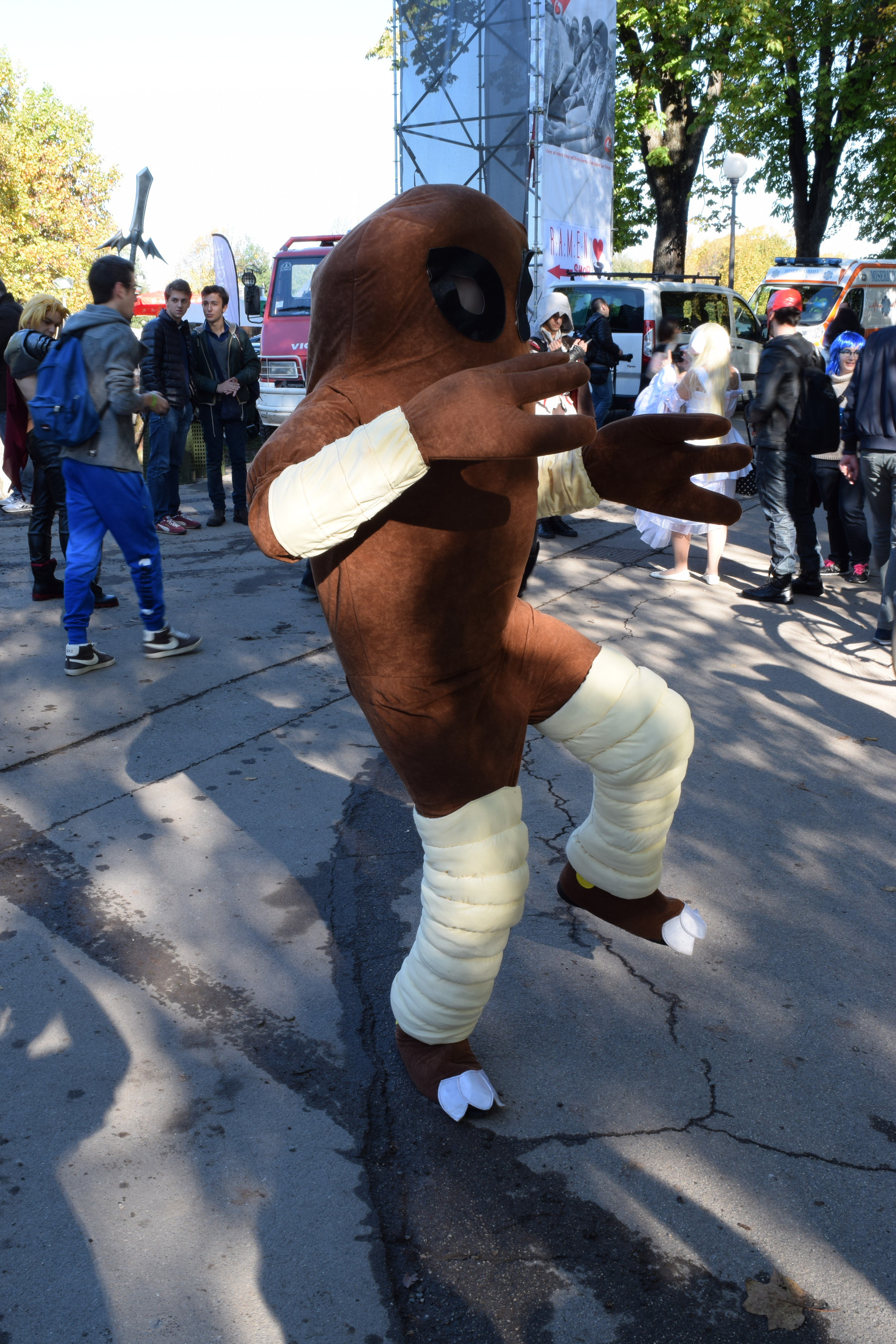 Déguisement de Kicklee.